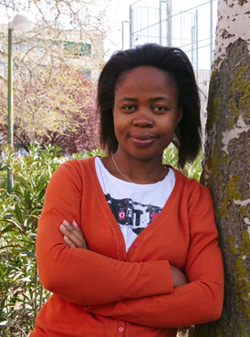 La escritora guineoecuatoriana Melibea Obono